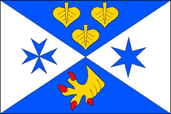 Vlajka obce Skalka u Doks